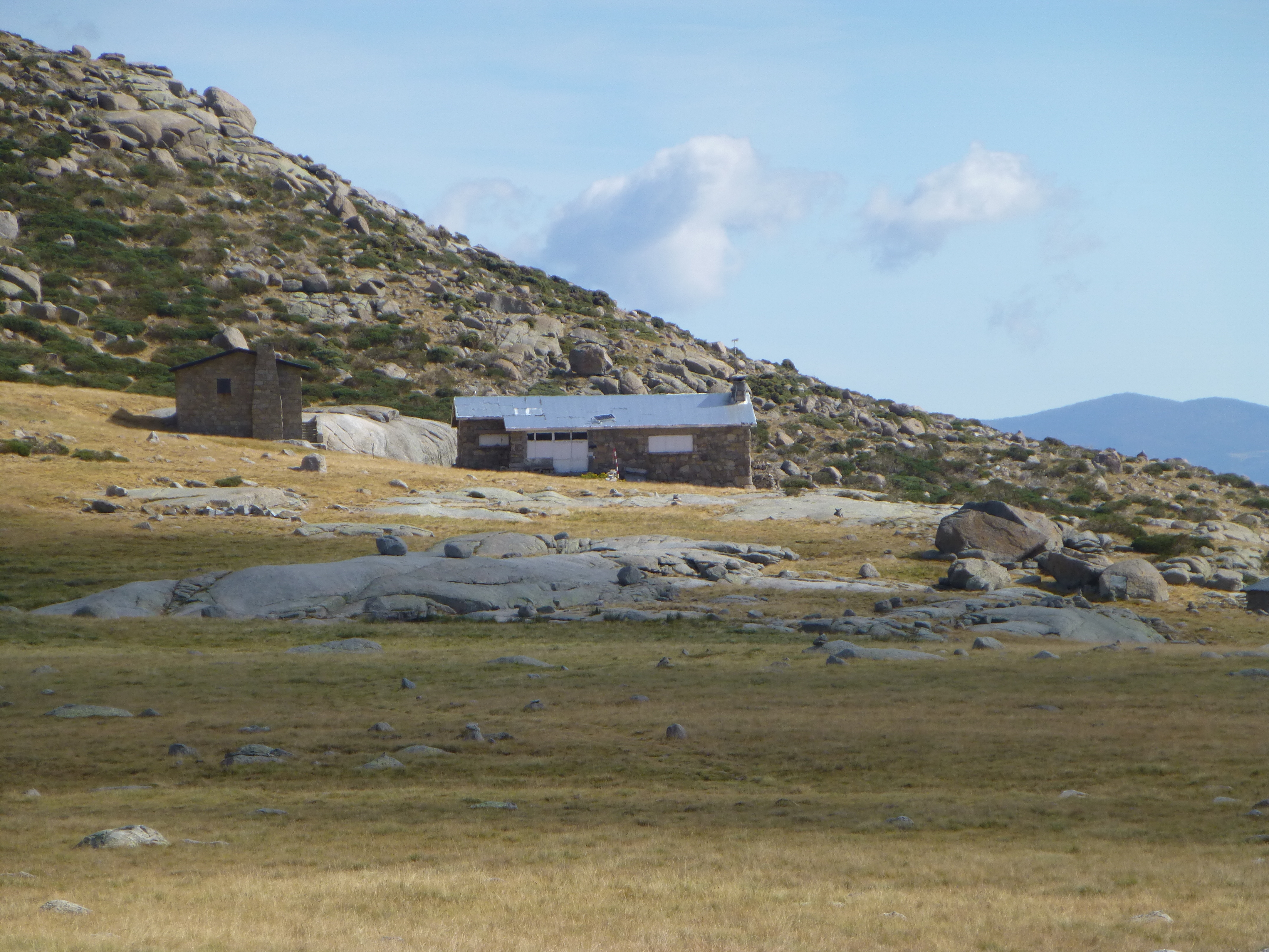 Refugio de Reguero Llano. San Juan de Gredos, Ávila, Castilla y León, España.